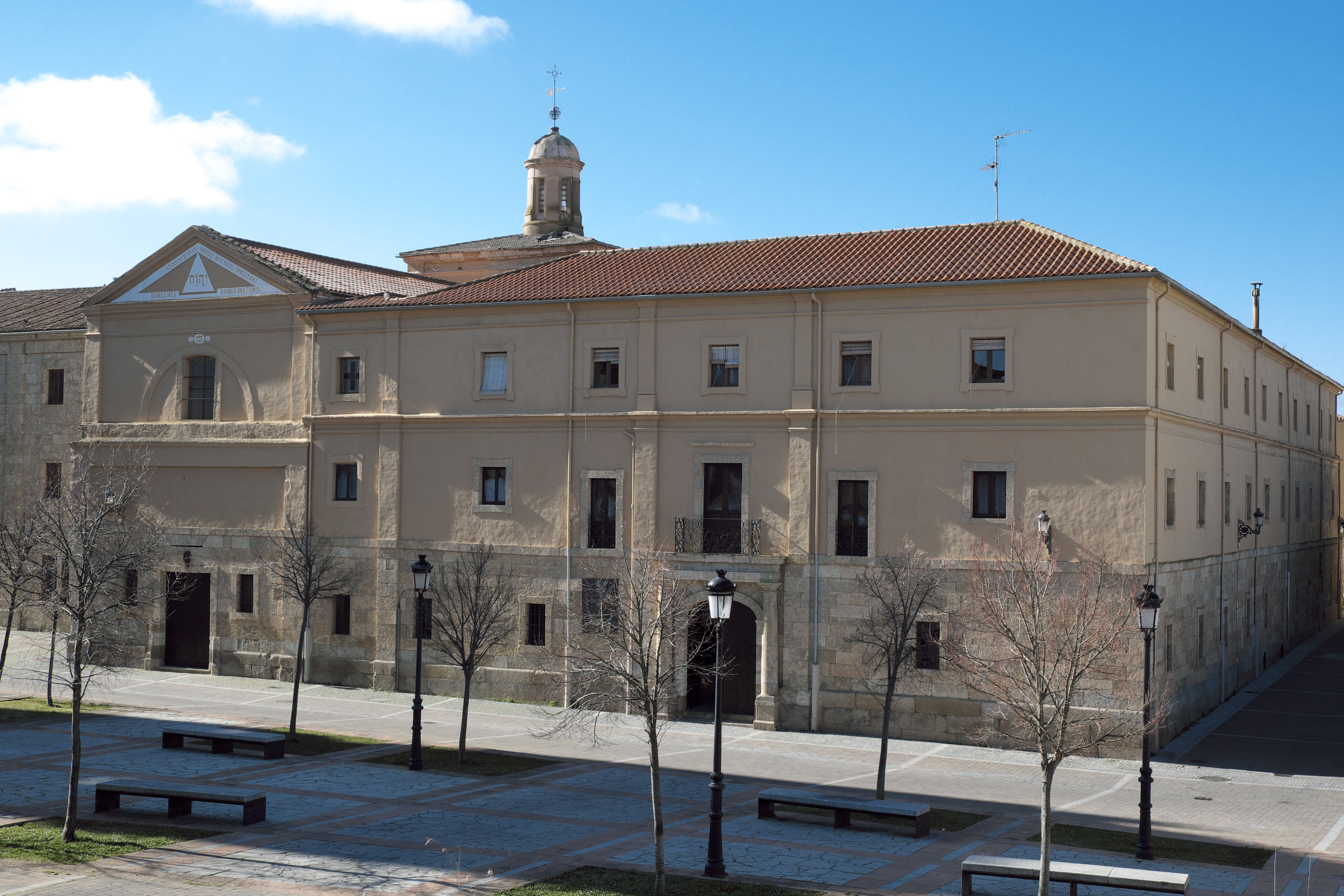 Ehemaliges Priesterseminar in Ciudad Rodrigo in der Provinz Salamanca (Kastilien-León/Spanien)